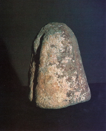 Baskoien arrantzako sarearen kontrapisua